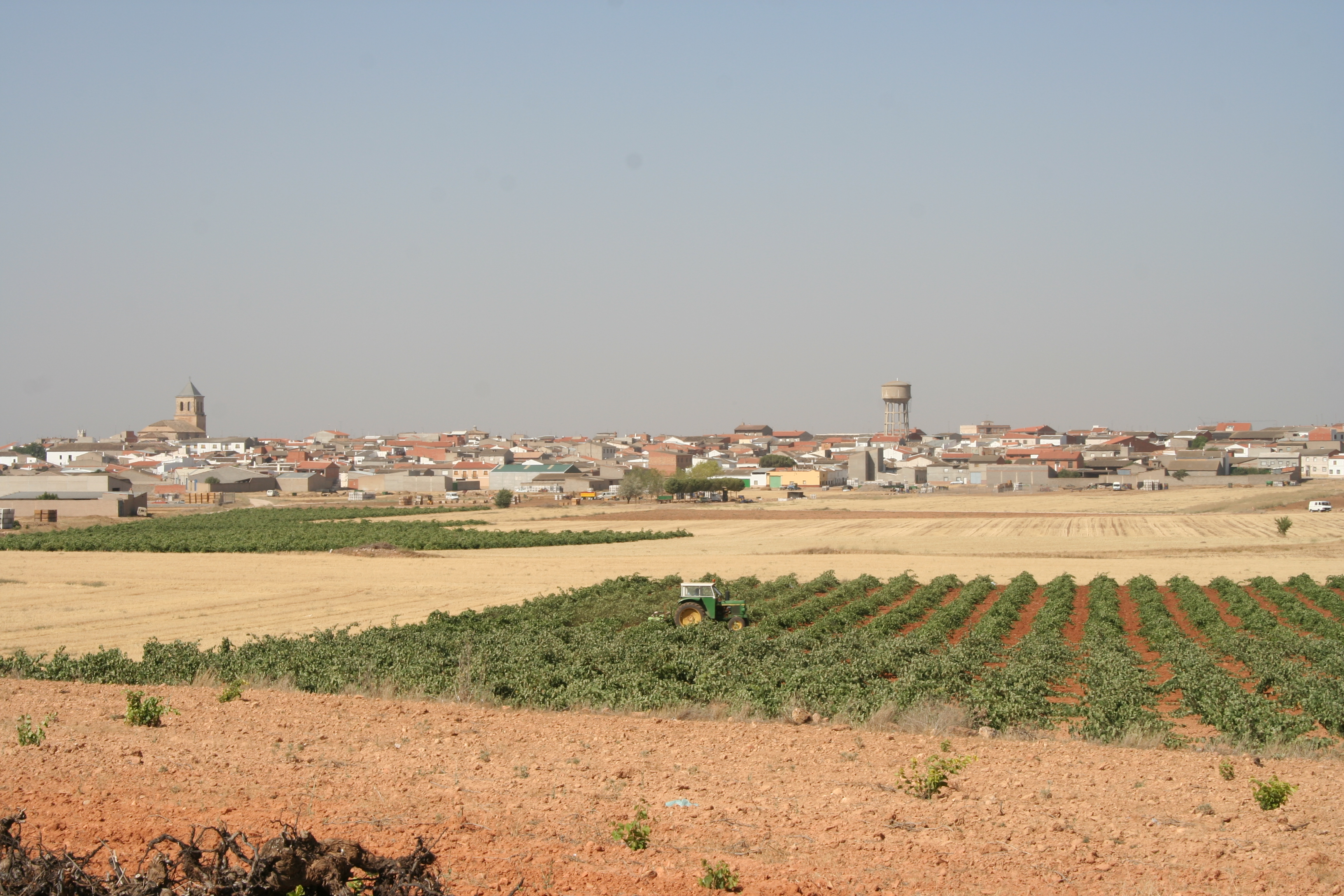 Vista de Las Pedroñeras desde la carretera de La Alberca.